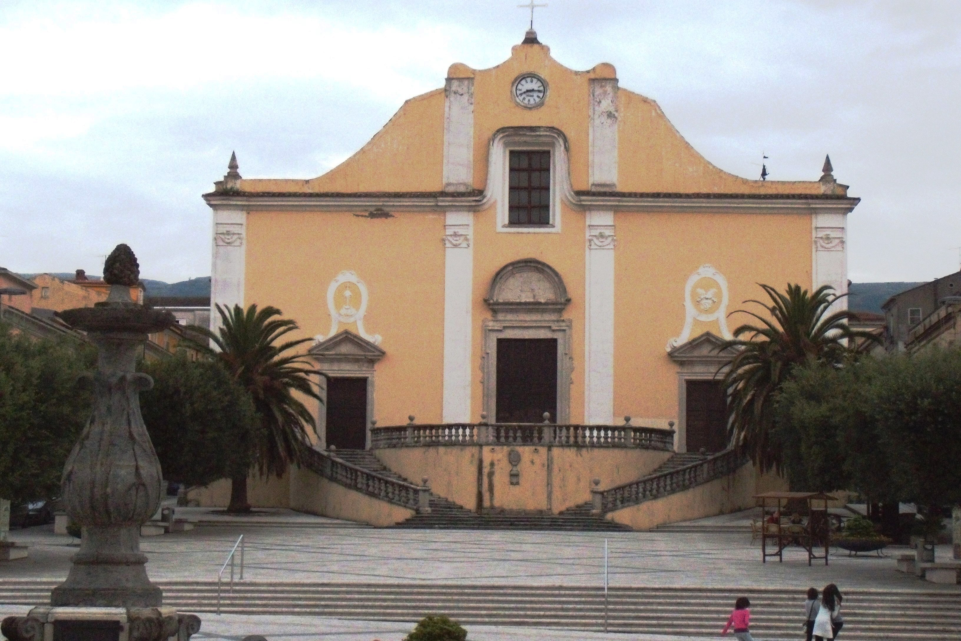 La Collegiata di San Martino nel comune di Cerreto Sannita (Benevento).